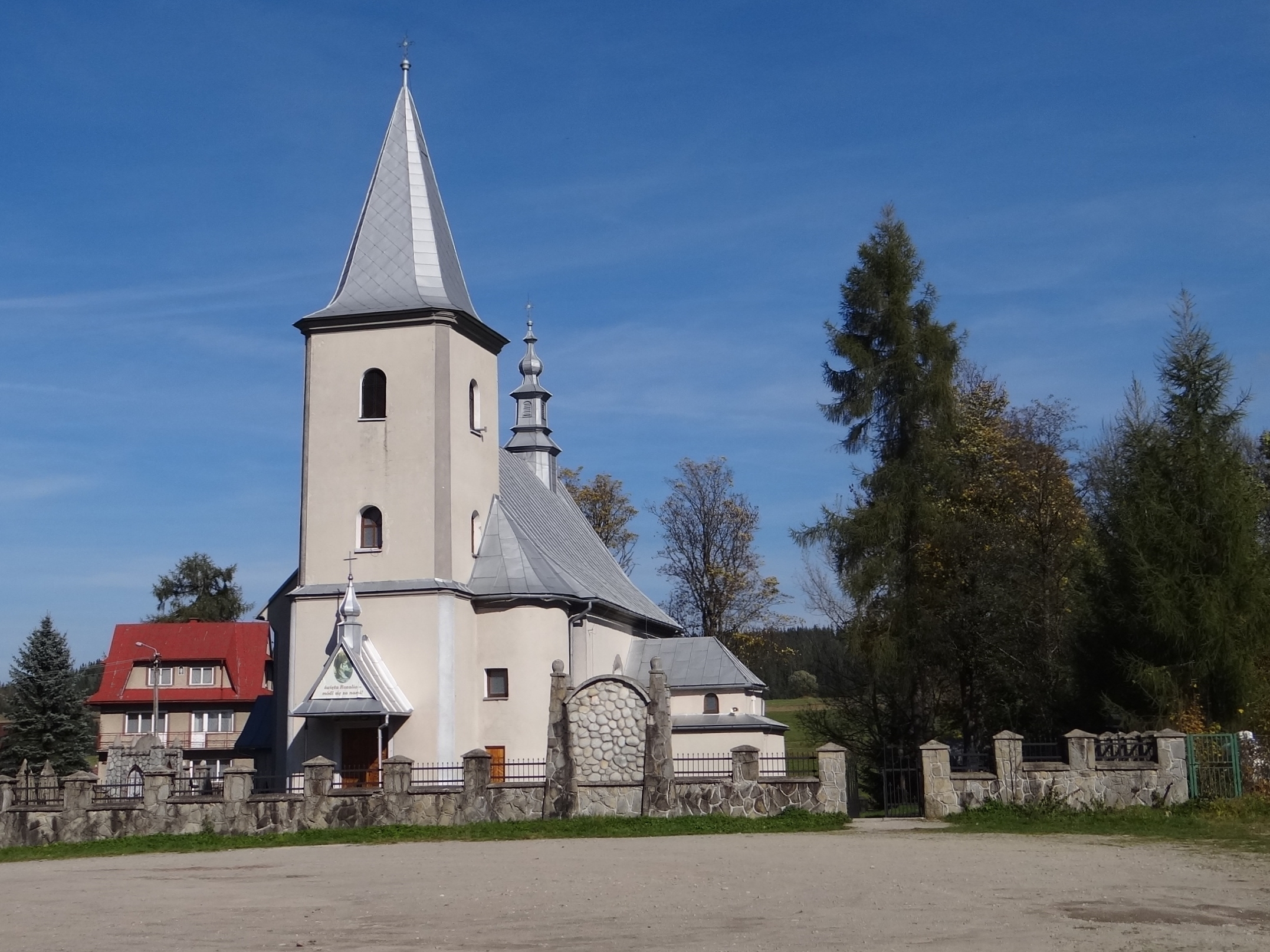 Kościół w Podszklu